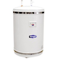 Calentador de tanque eléctrico.